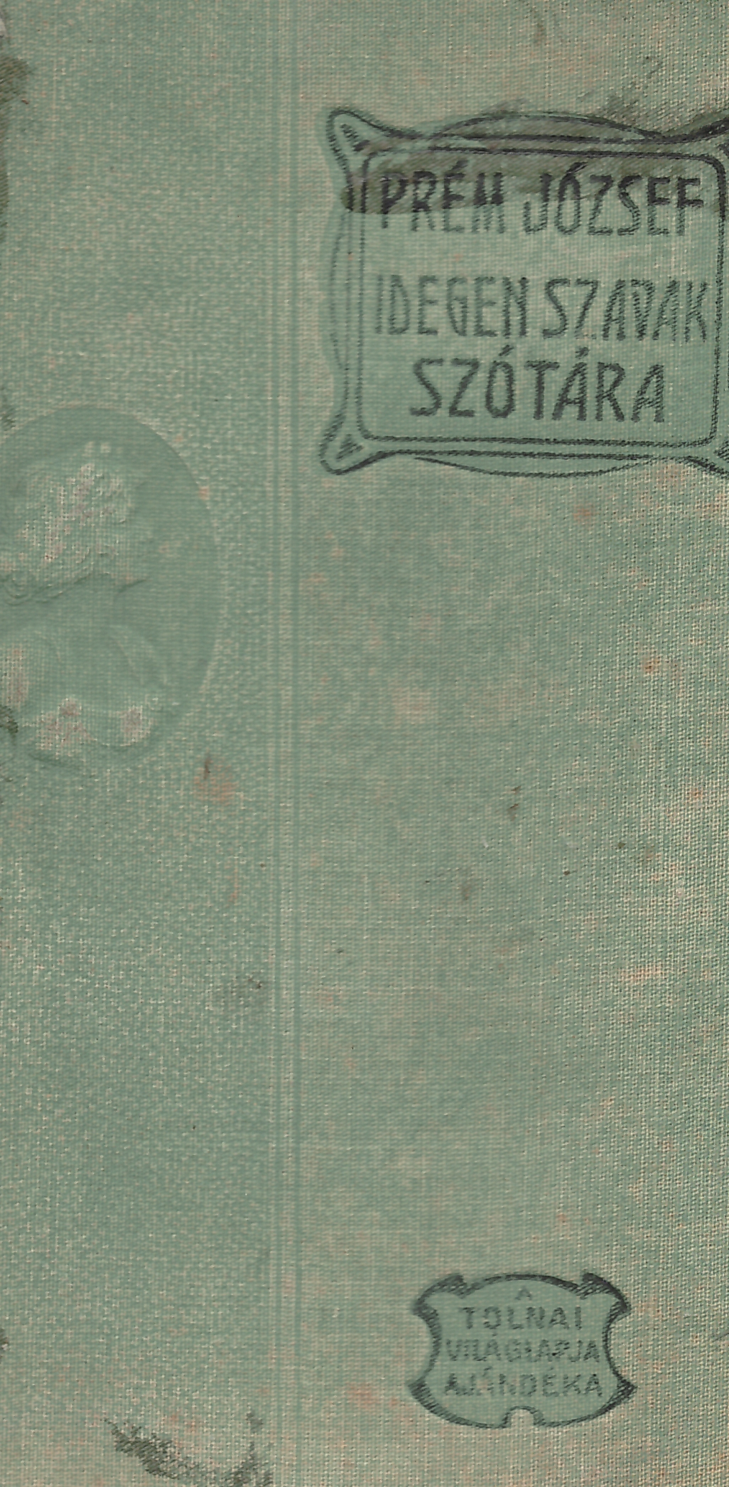 Prém József (1850-1910): Idegen szavak szótára (1909)